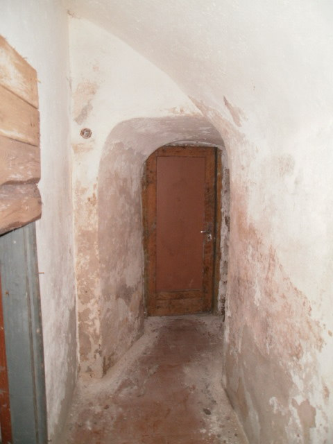 Arhailine käik või ukseava oletatava torni kõrval hoone põhjatiiba.